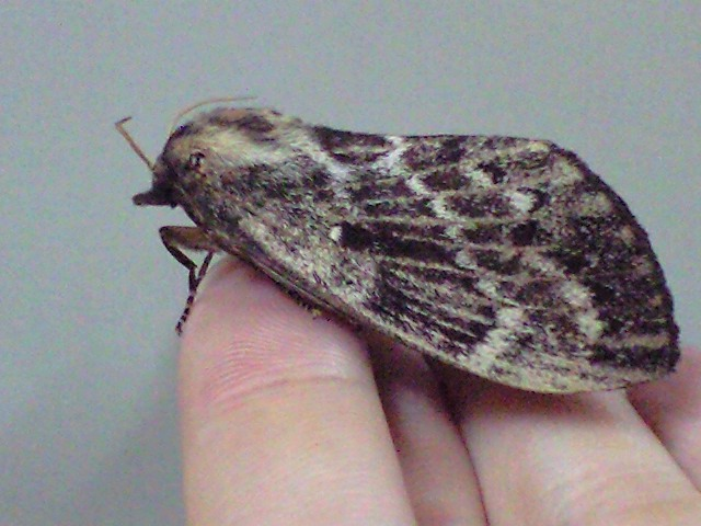 マツカレハ♀メス